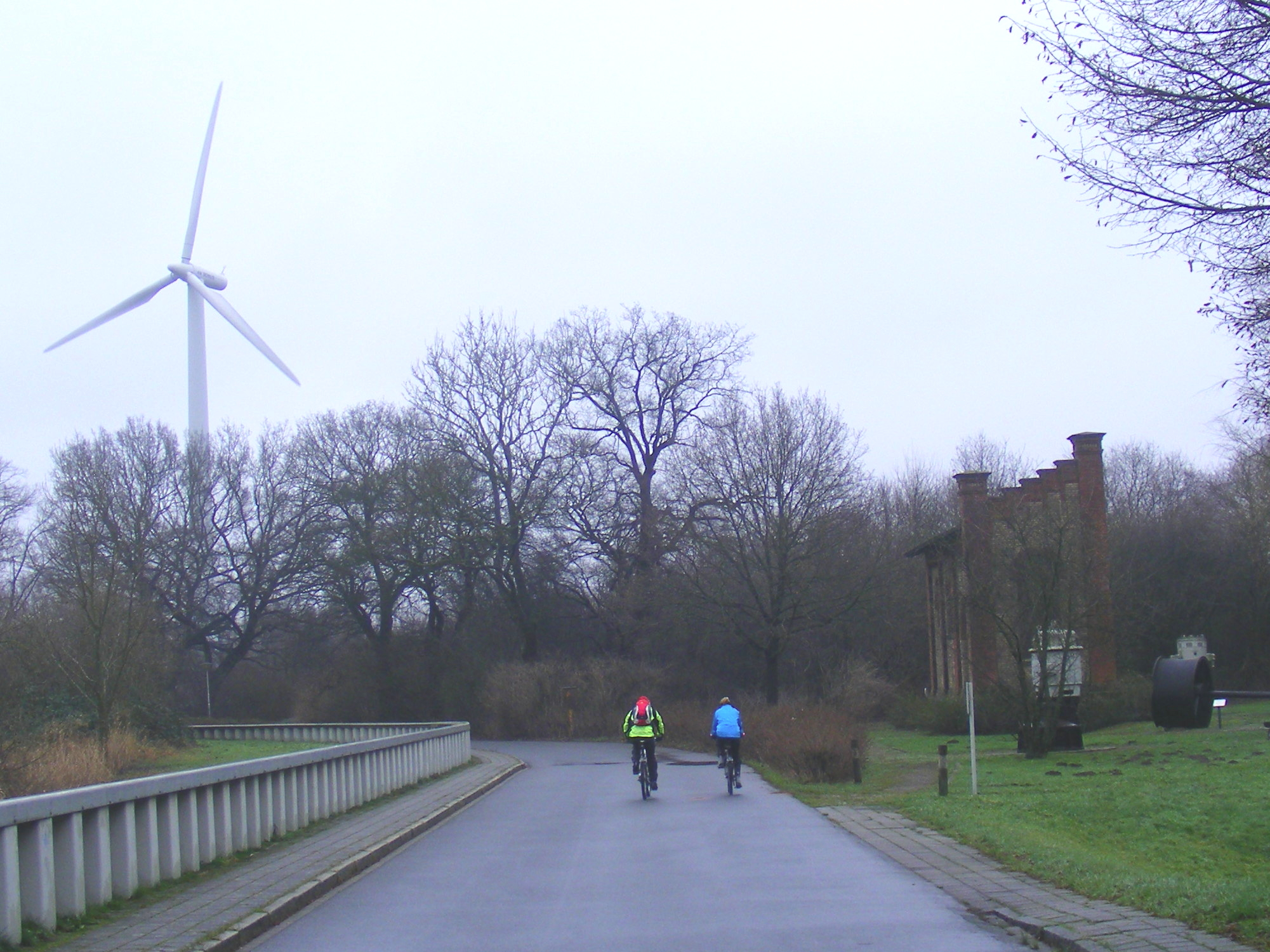 Altes Schöpfwerk Wasserhorst, geradeaus Gebäuderest mit ausgestellten Teilen der Pumpenausrüstung. Der heutige Deich mit Straße und Spundwand (links) versperrt die alte Mündung des Maschinenfleets in die Lesum. Das Windrad im Hintergrund steht jenseits des neuen Schöpfwerks.